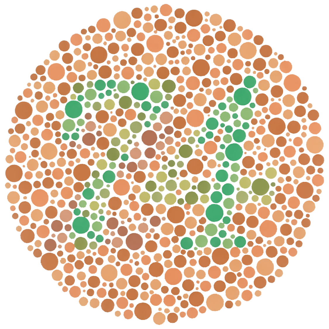 Ishihara Plate 9